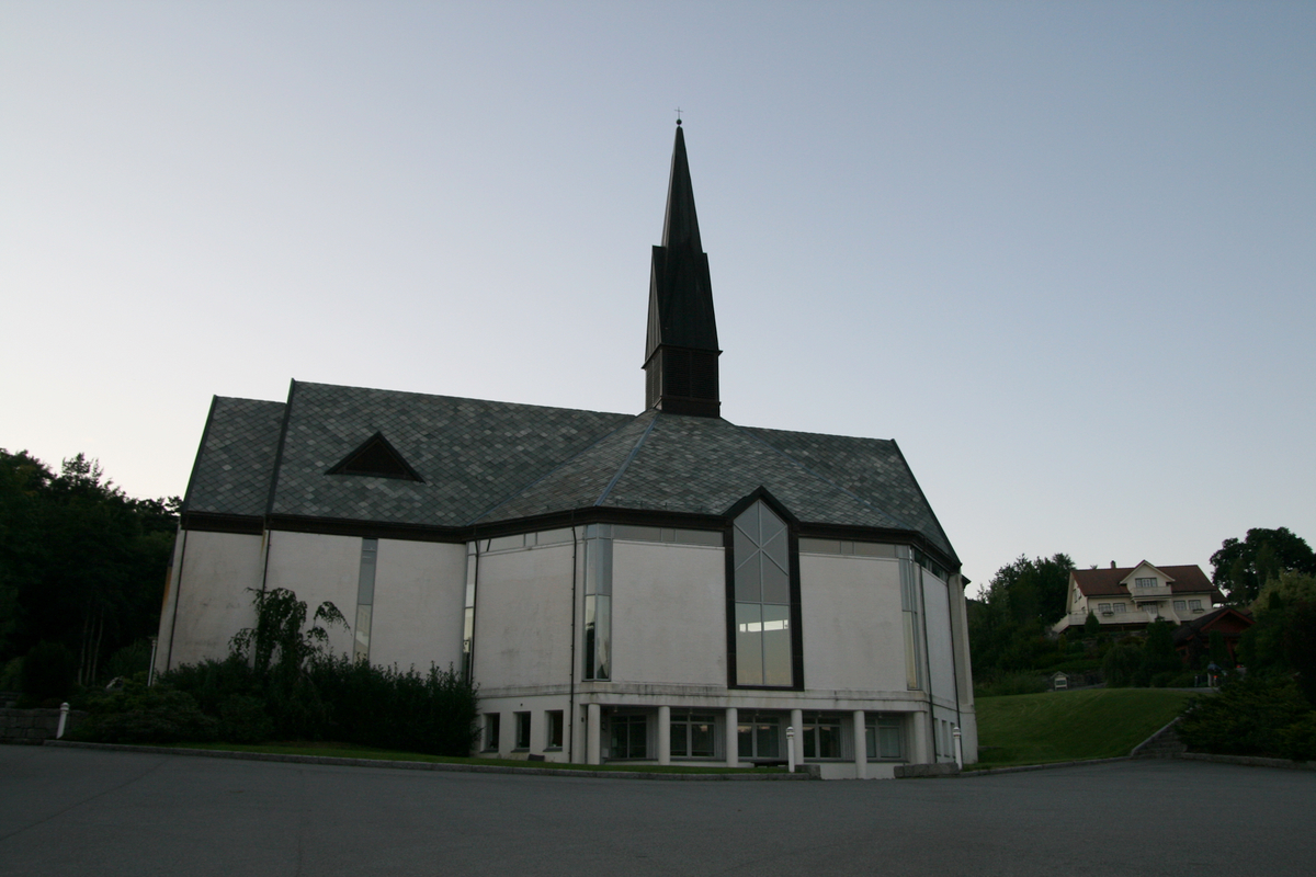 Skjold kyrkje